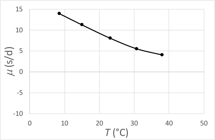 Marche en fonction de la température d'une montre mécanique en position horizontale. Calibre ETA 2801.